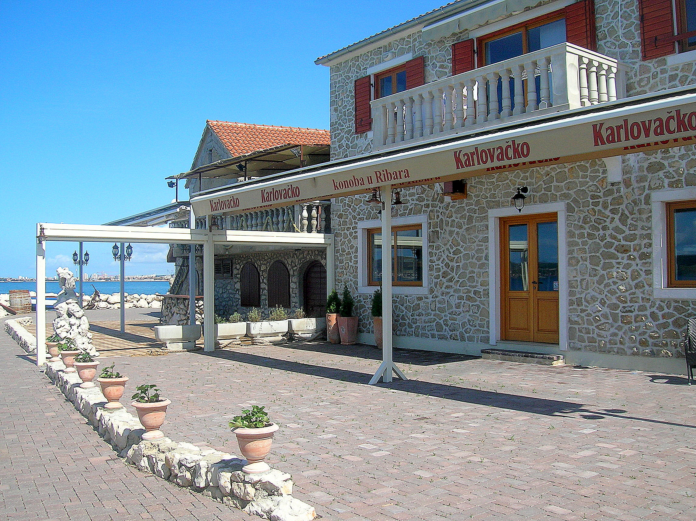 la marina